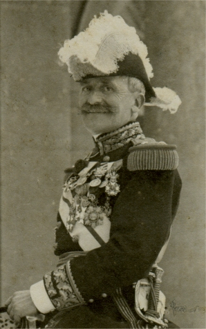 général Maurice Bailloud (1847-1921)